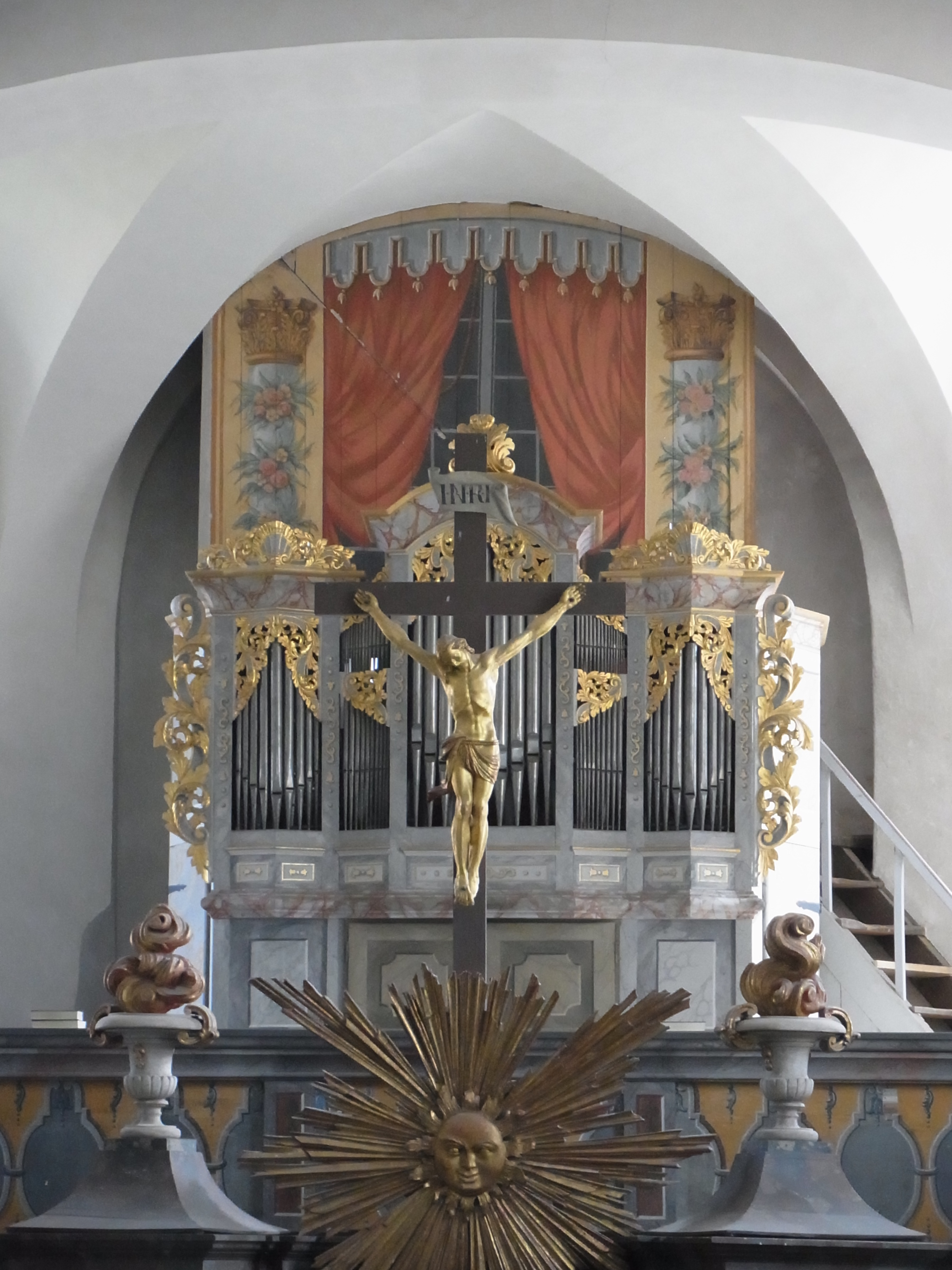 Hohnstein kostel